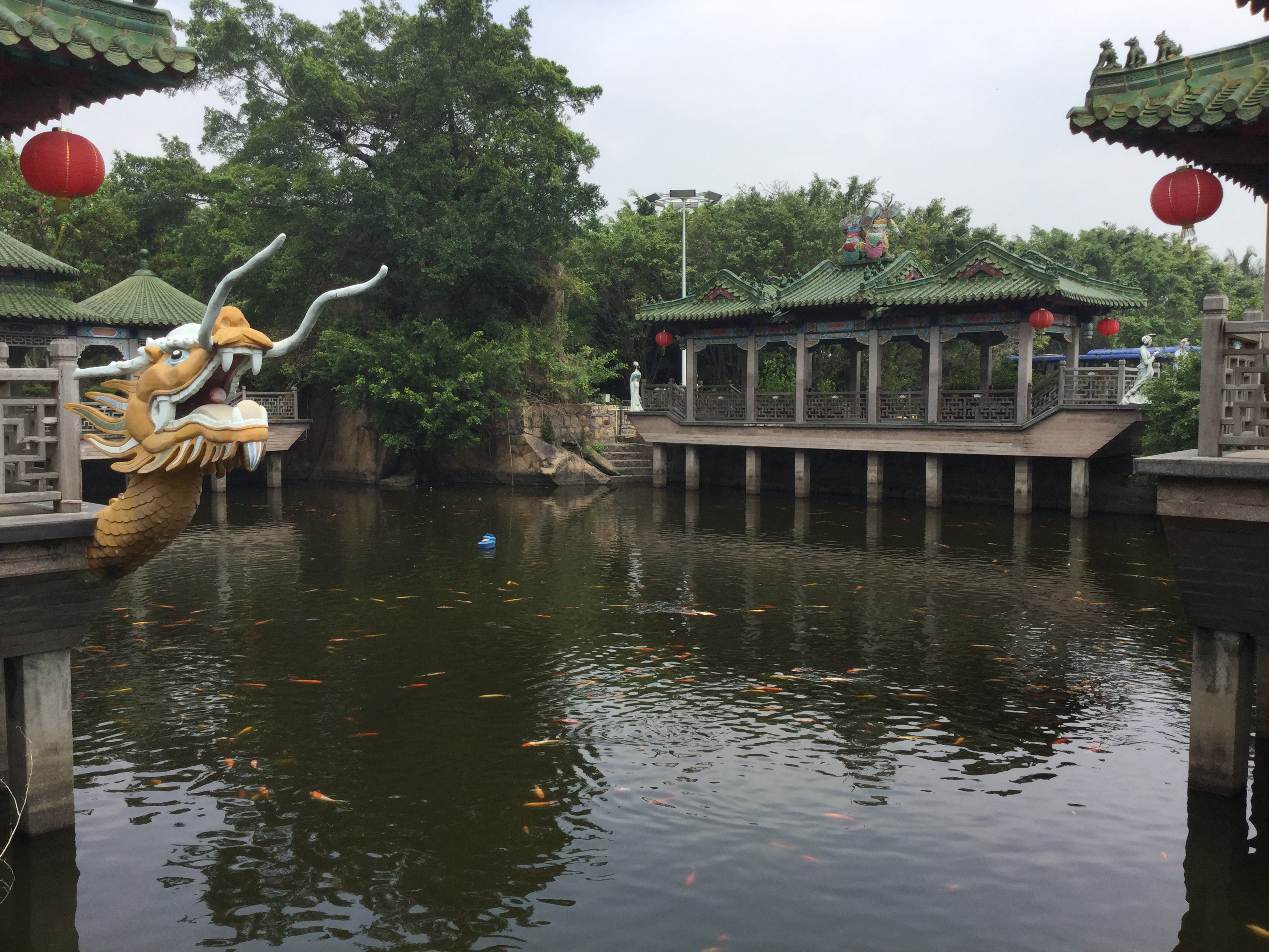 龙船舫，汕头天坛花园